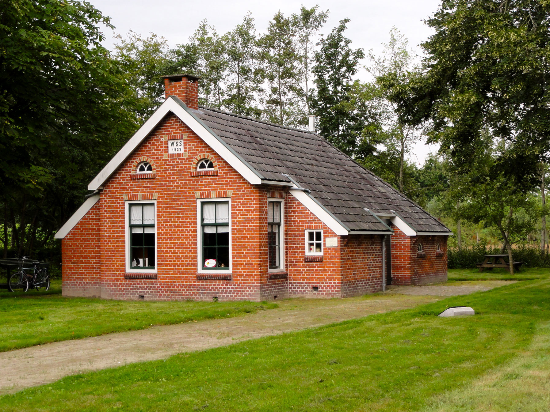 Skoallewijk 10 in Houtigehage